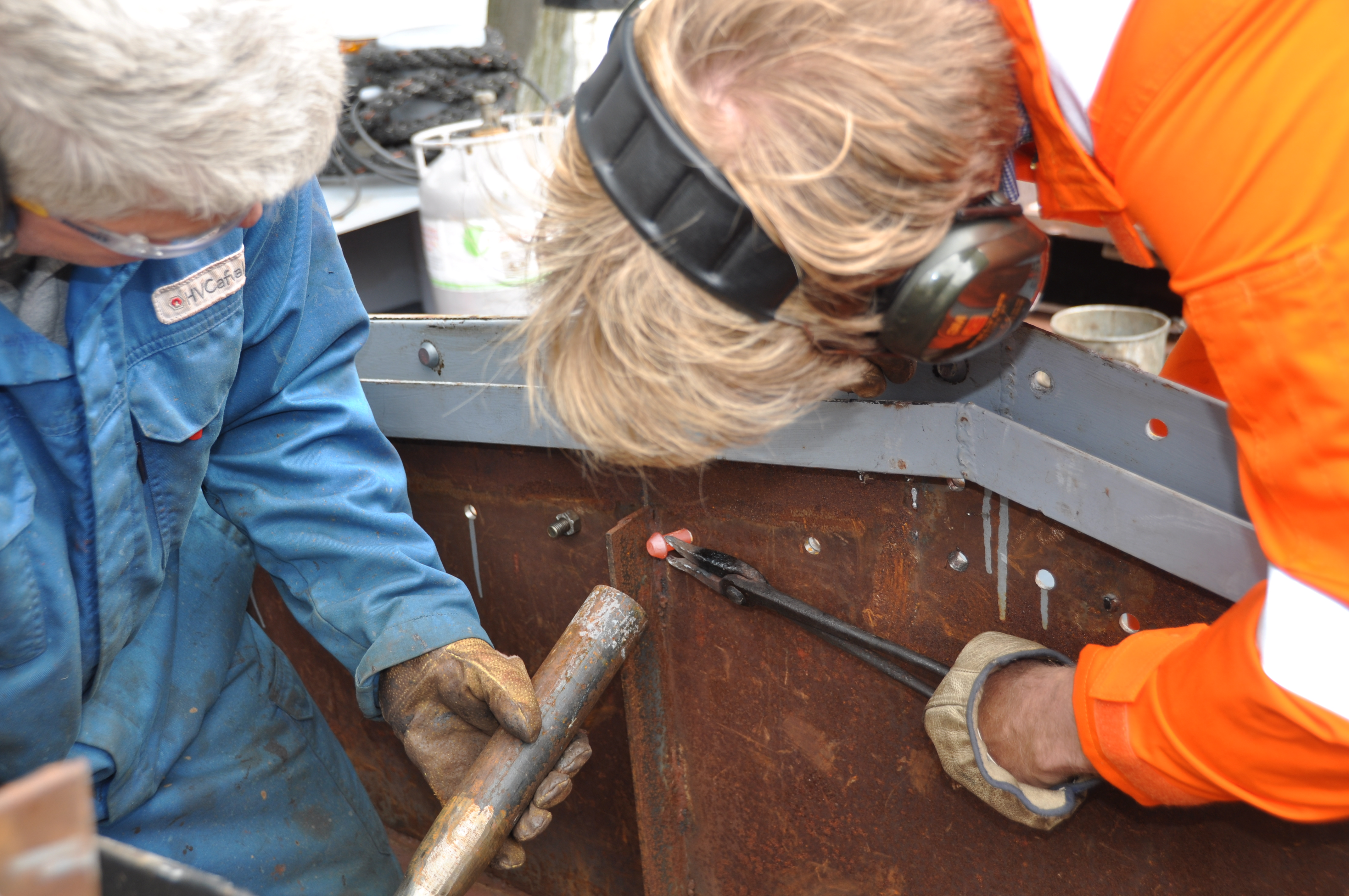 Klinkwerk op de museumwerf in Gouda